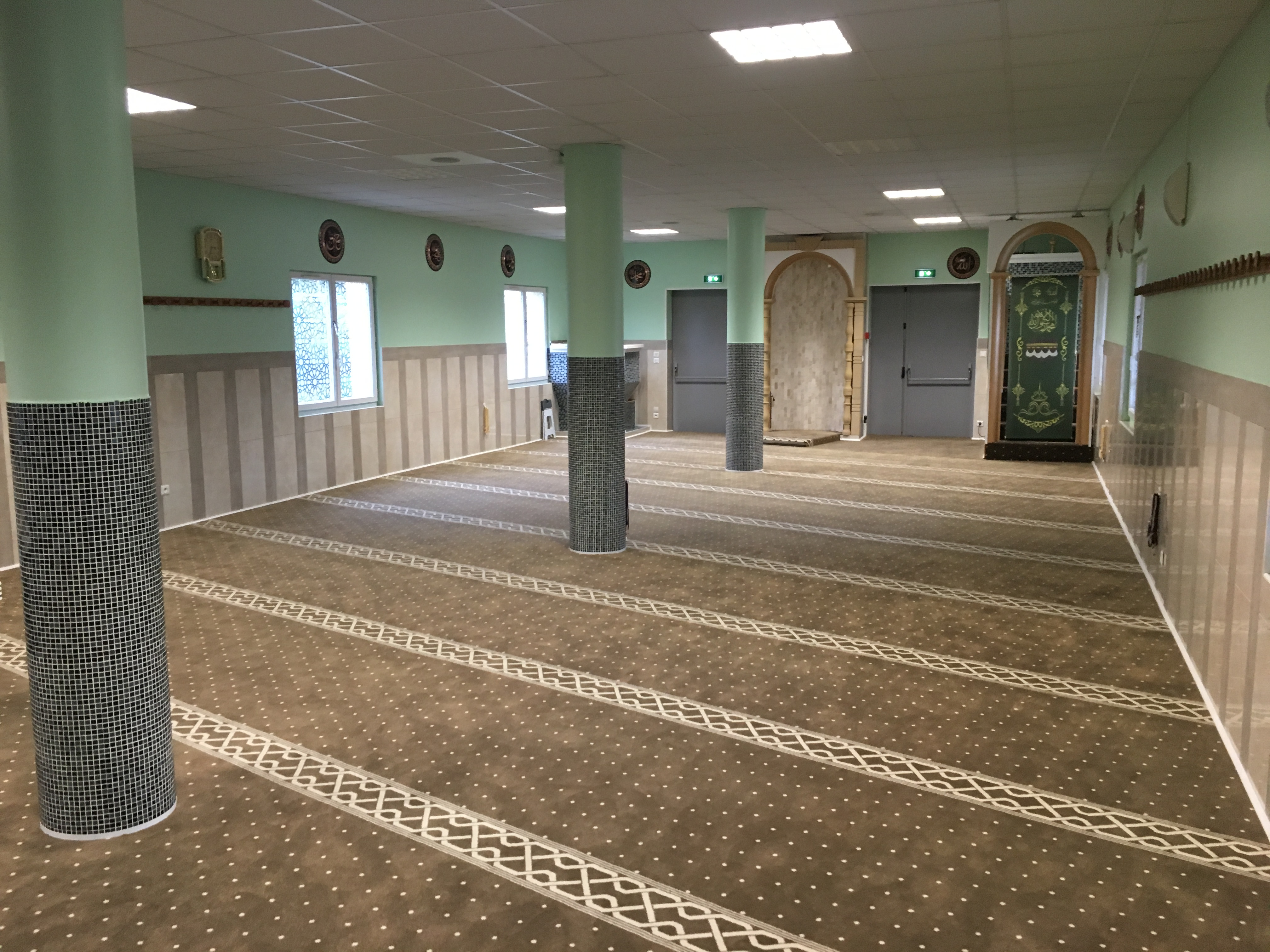 Mosquée Turque de Dreux, 2019.